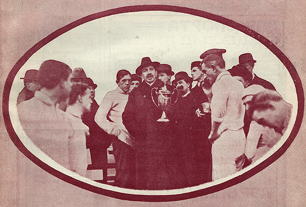 22 октября 1912 года. Роберт Фульда передает кубок имени Фульды команде "Клуб спорта Орехово", выигравшей его третий раз подряд